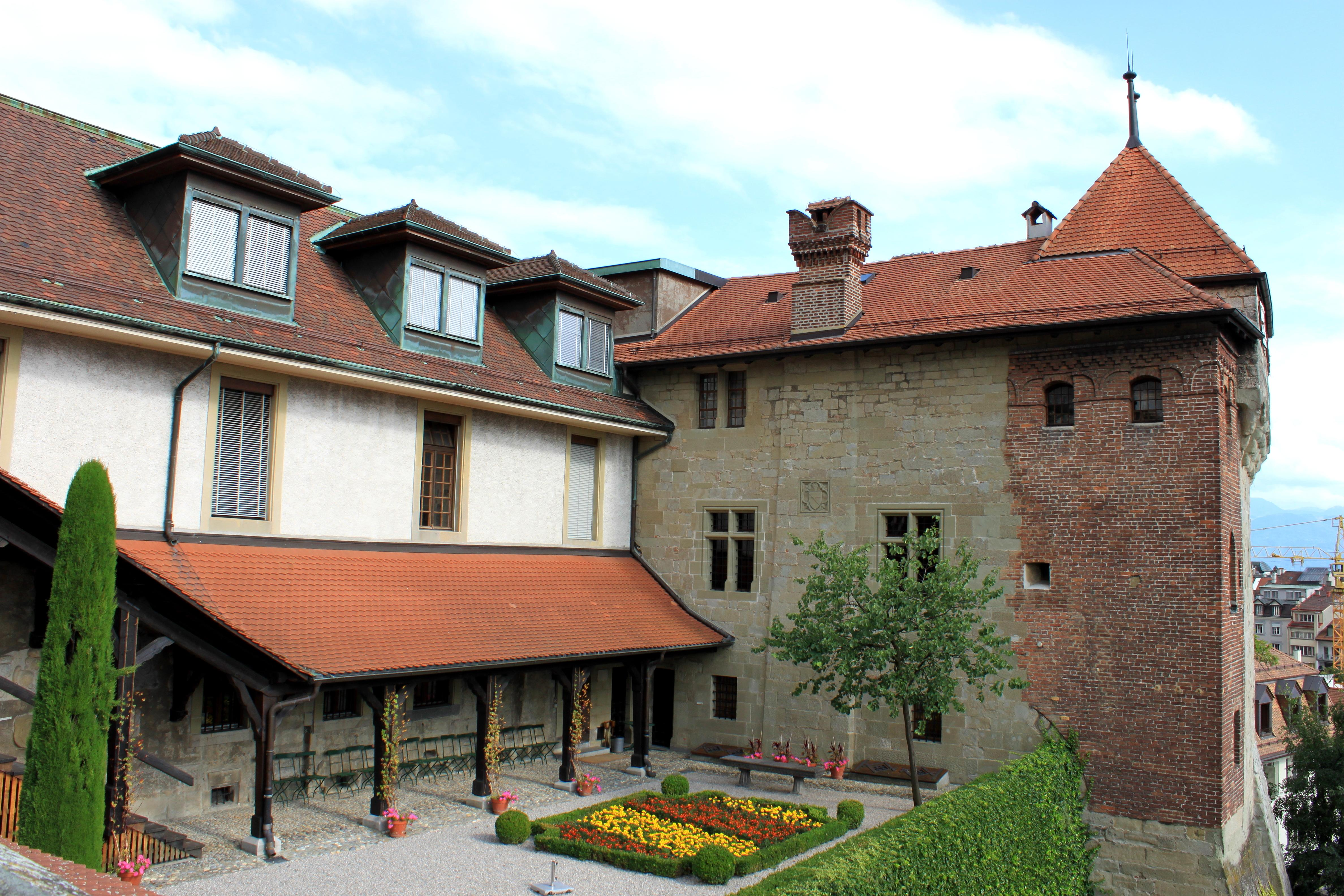 Suisse, canton de Vaud, Lausanne, ancien évêché et Musée historique de Lausanne. Construit en l'an mil comme résidence épiscopale, utilisé par la suite comme prison, tribunal et école, il devient le Musée historique de Lausanne en 1989.